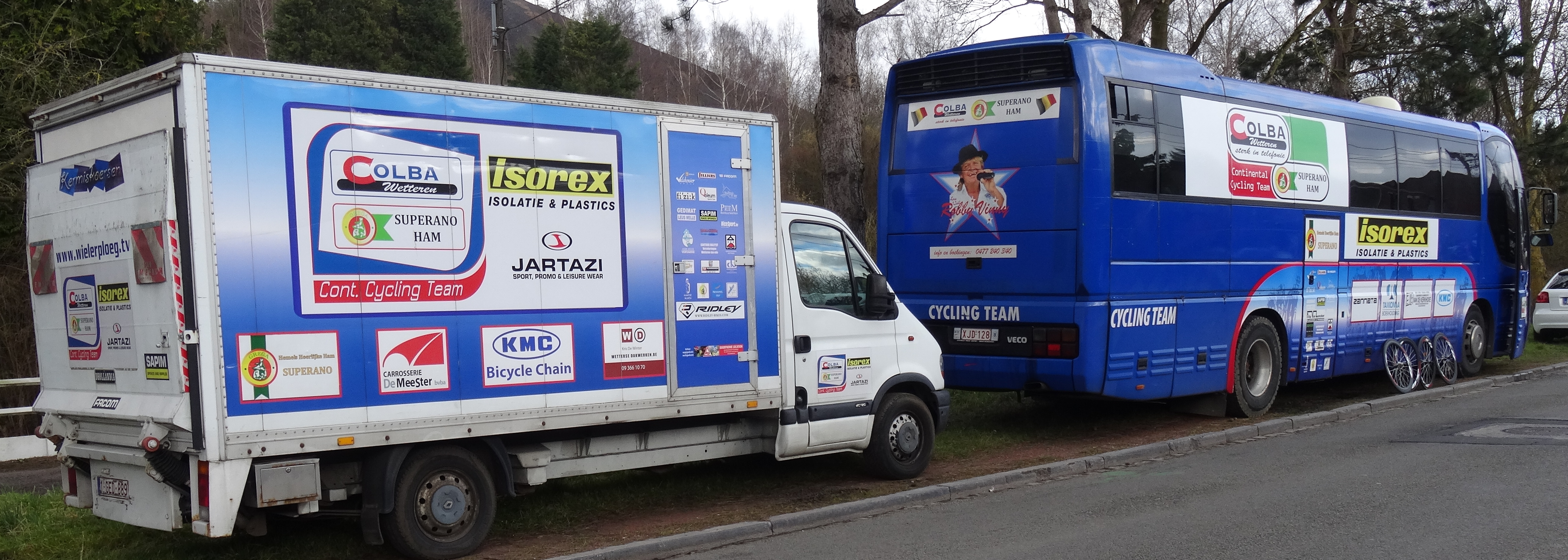 Reportage réalisé le mercredi 4 mars à l'occasion de l'arrivée du Samyn des Dames 2015 et du Samyn 2015 à Dour, Belgique.